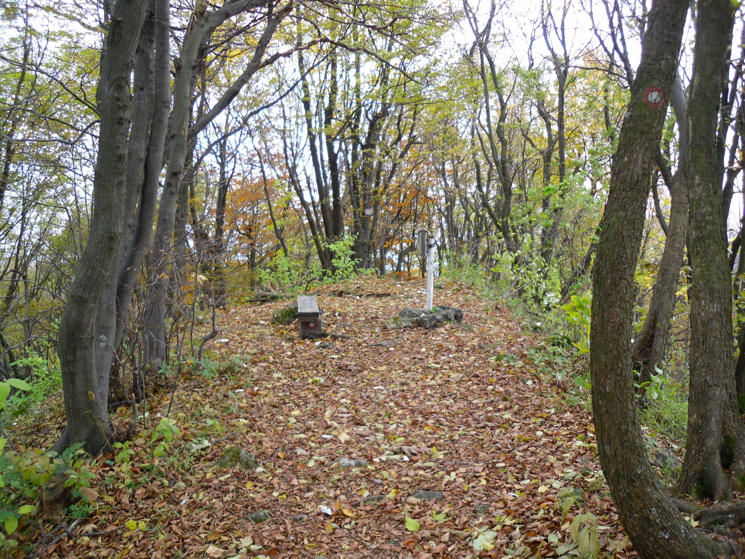 Tovsti vrh